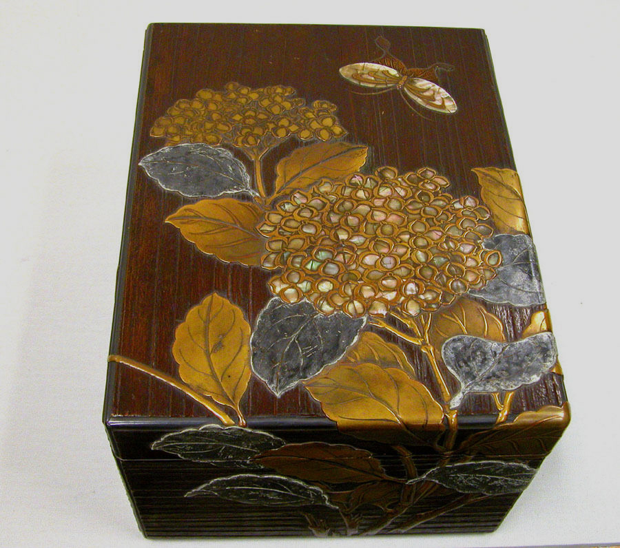 Japan; Document box; Lacquer